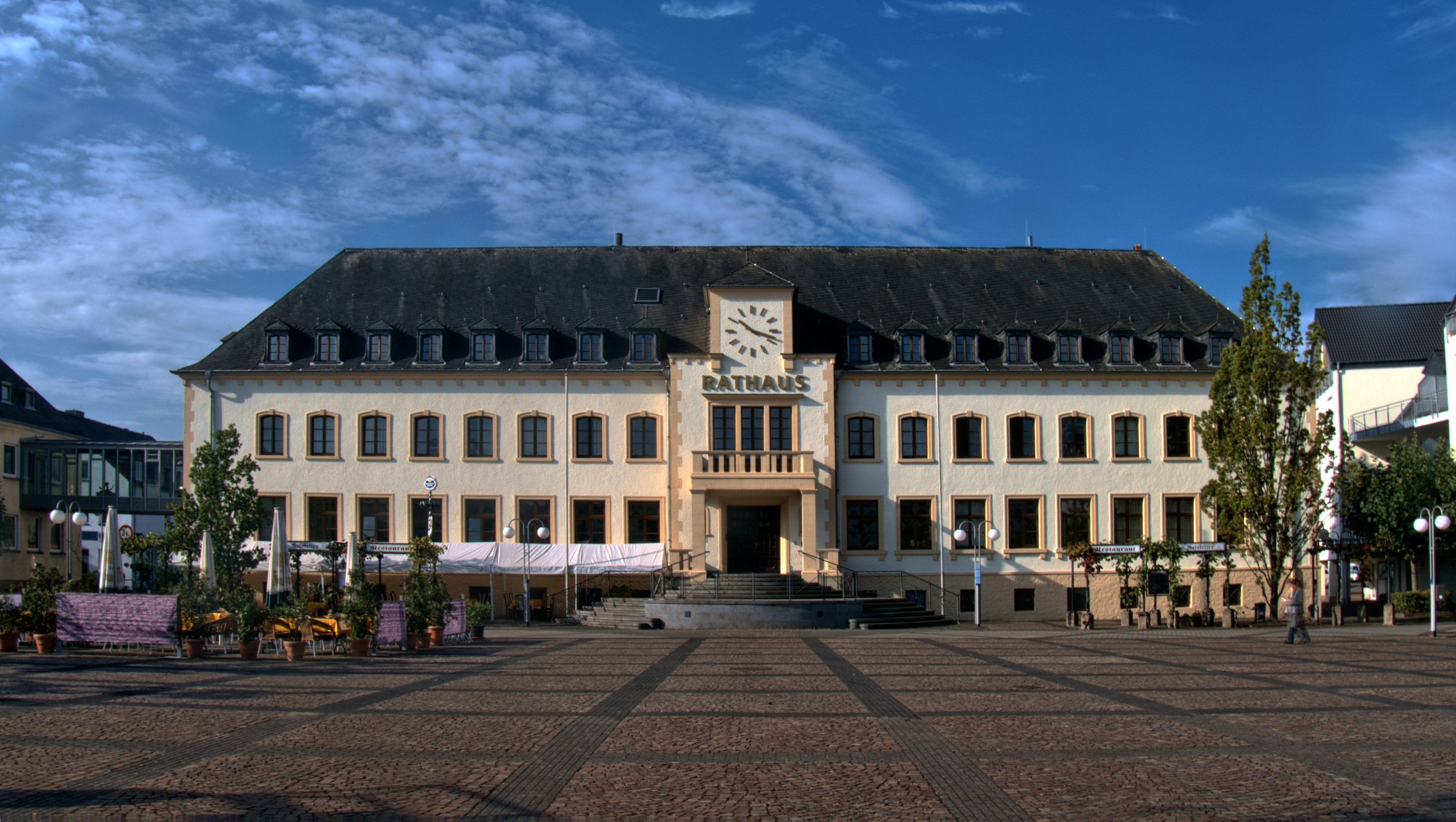 Rathaus der Stadt Konz. Traditionalistischer Walmdachbau von 1949/51.